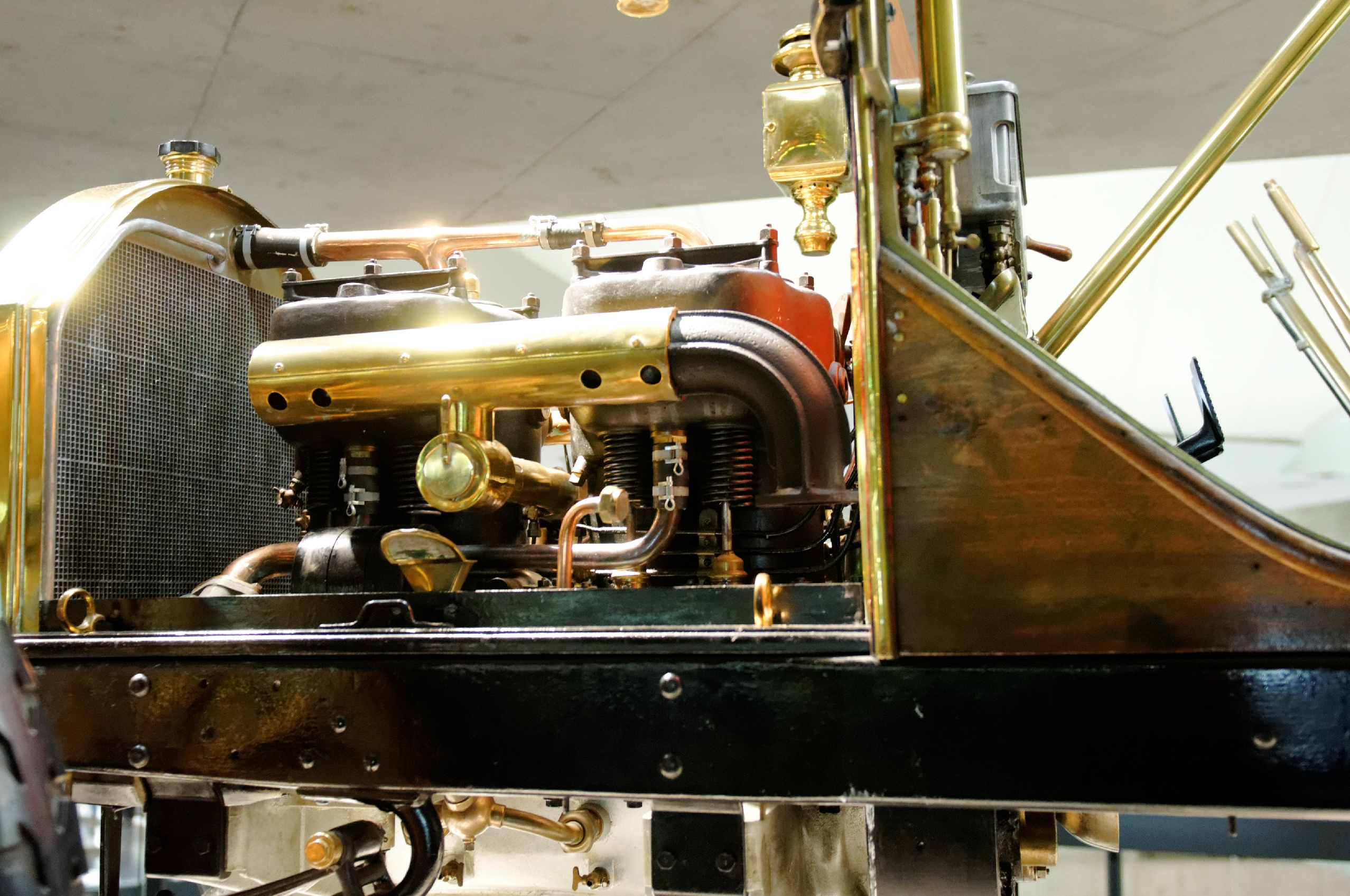 Bilder aus dem Mercedes-Benz-Museum 2015